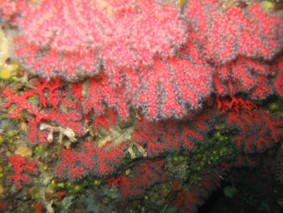 Corallo Rosso (Corallium rubrum) nella grotta di Amphitrite (Alghero)